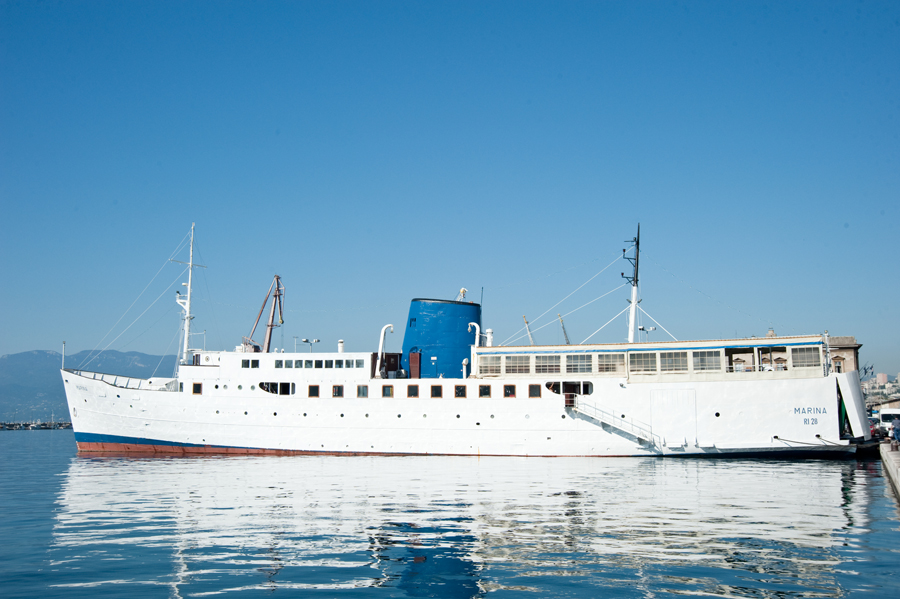 Marina, Rijeka